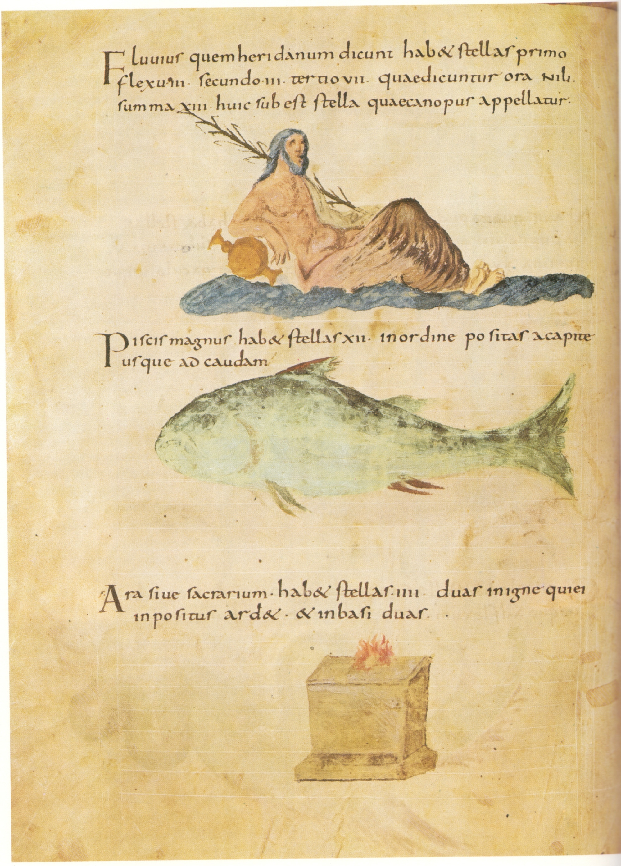 Madrid, Bibl. Nacional, Cod. 3307 (61v) Metz, um 840 Eridanus, Piscis, Ara